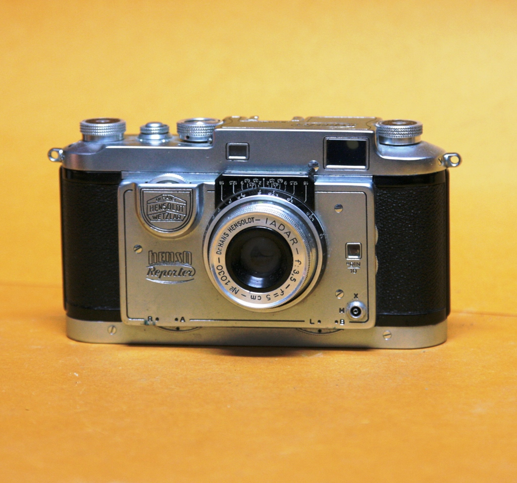 Coll. Marcè CL - Hensoldt Reporter Henso 1953 Dr. Hans Hensoldt, Wetzlar, 24 x 36 mm, no 1030. Focal plane shutter, rangefinder, folding rapid-advance lever